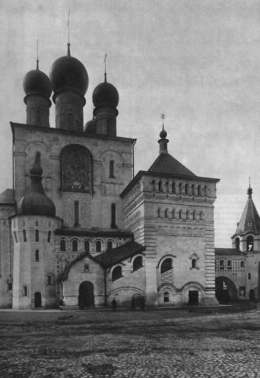 Храм в память 300-летия дома Романовых, Санкт-Петербург, 1913—1914